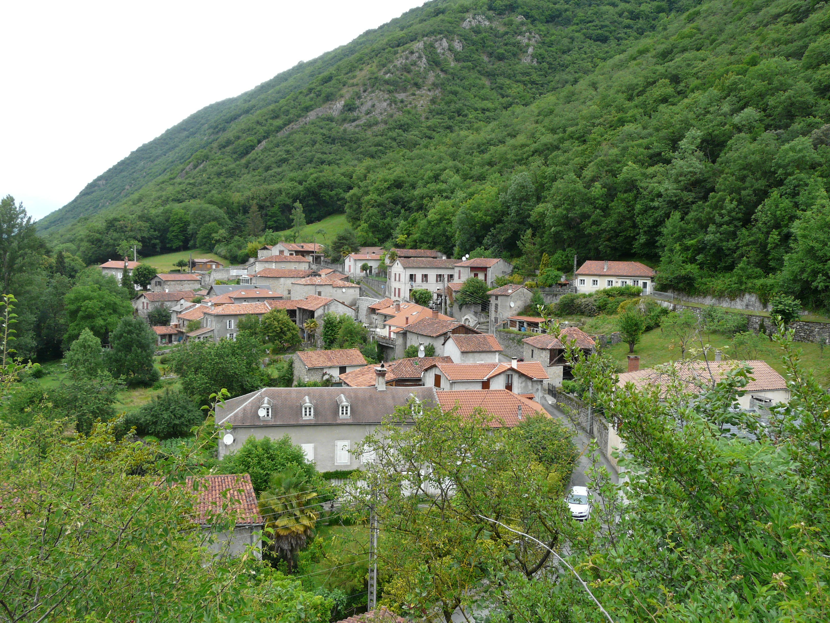 Le village de Galié, Haute-Garonne, France.